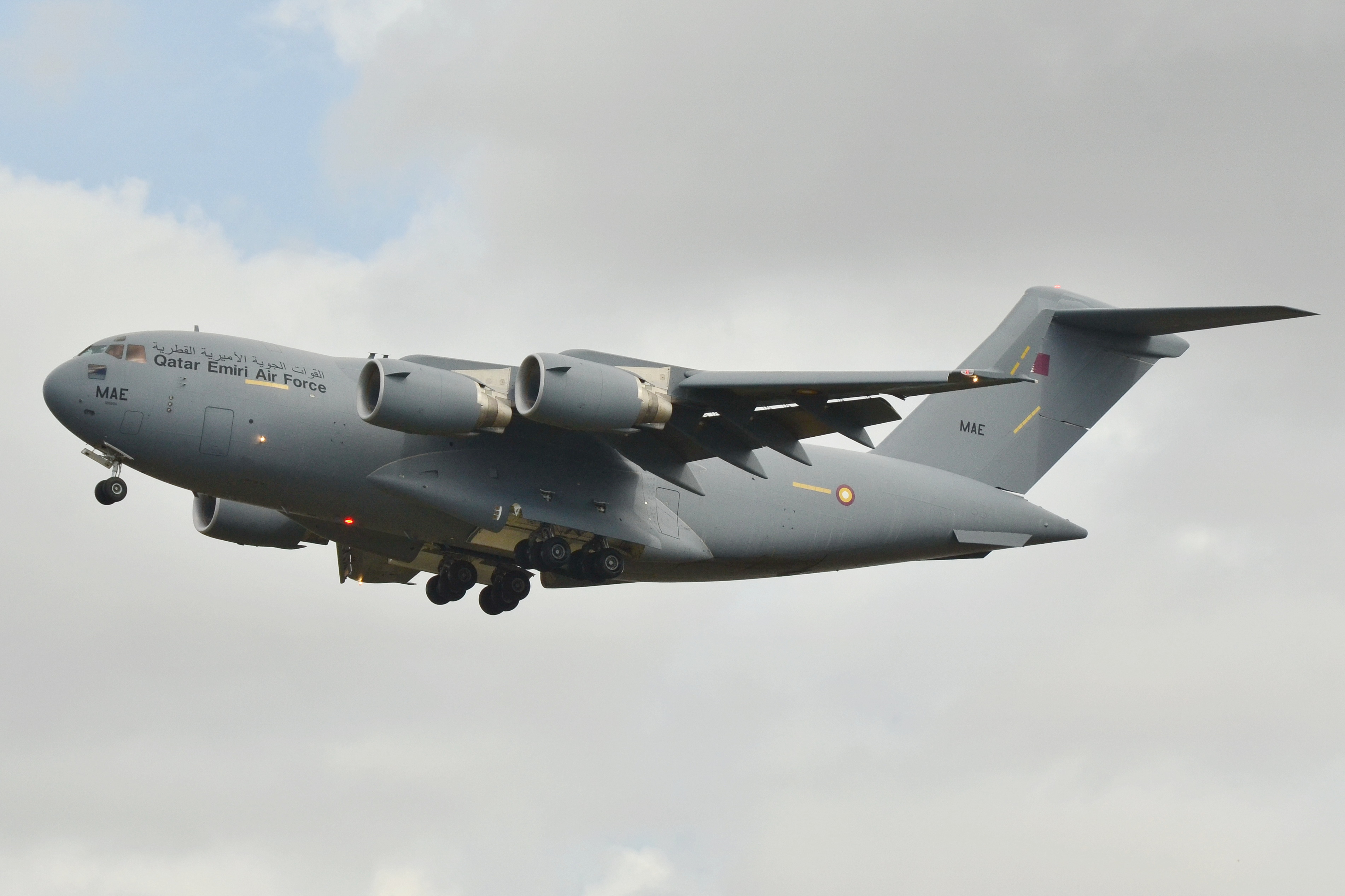 Photo prise à l'aéroport de Toulouse-Blagnac (LFBO) en France. Picture take at Toulouse-Blagnac Airport (LFBO) in France.